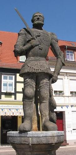 Roland-Statue in Perleberg, Brandenburg